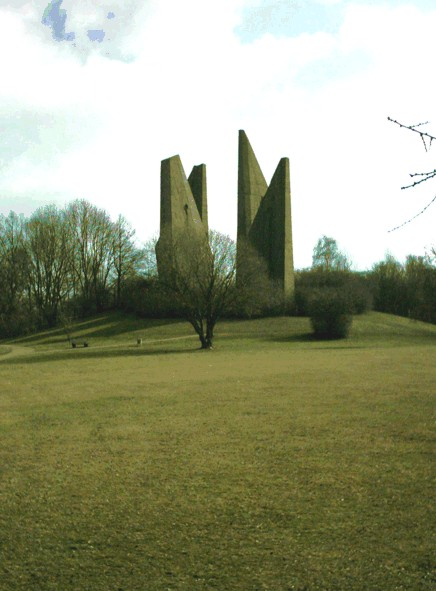 Beschreibung: Heimkehrerdenkmal in Friedland Fotograf: presse03, selbst erstellt, 14.03.2004 Lizenz: GNU-FDL Kategorie:Bild:Denkmal